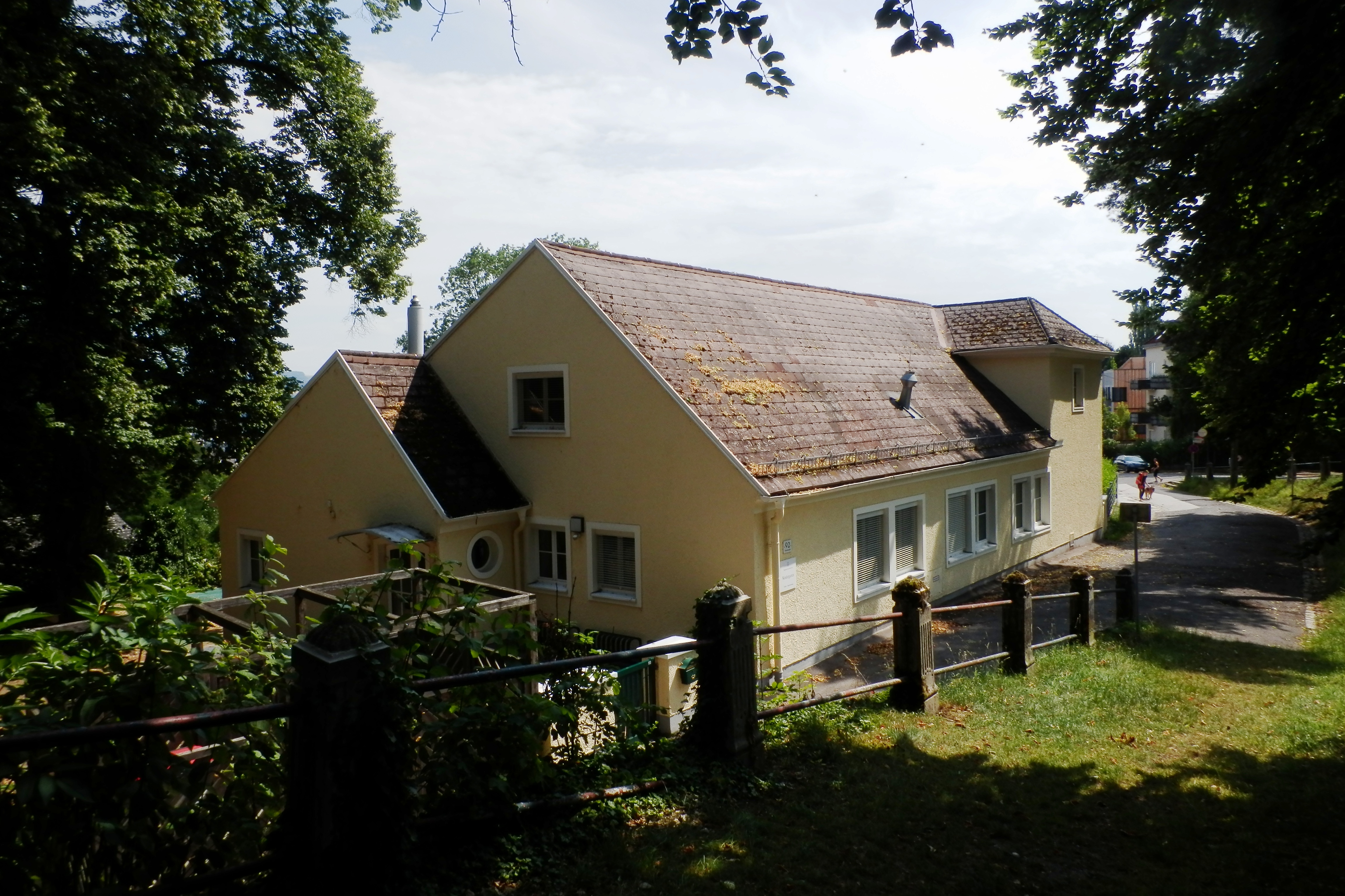 Ehem. Gasthaus Paradiesgarten, Linz, Römerstraße - heute städtischer Kindergarten